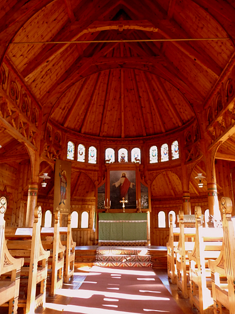 Interiør i St. Olaf's Church i Balestrand, Sogn og Fjordane